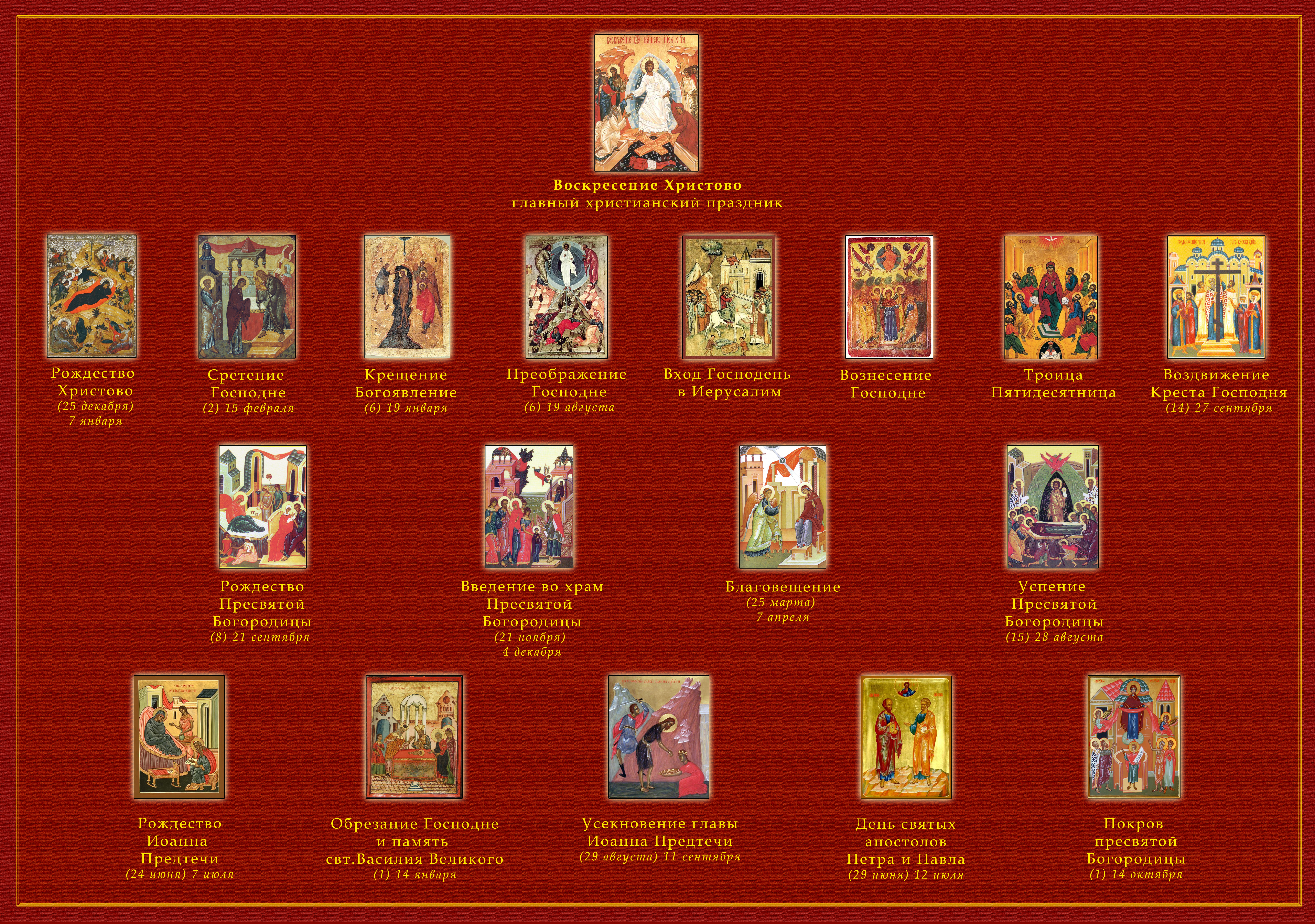 Двенадцать великих праздников христианства и главнейший праздник - Пасха. Двунадесятые праздники разделяются на "Господские" и "Богородичные". Господские стоят выше Богородичных